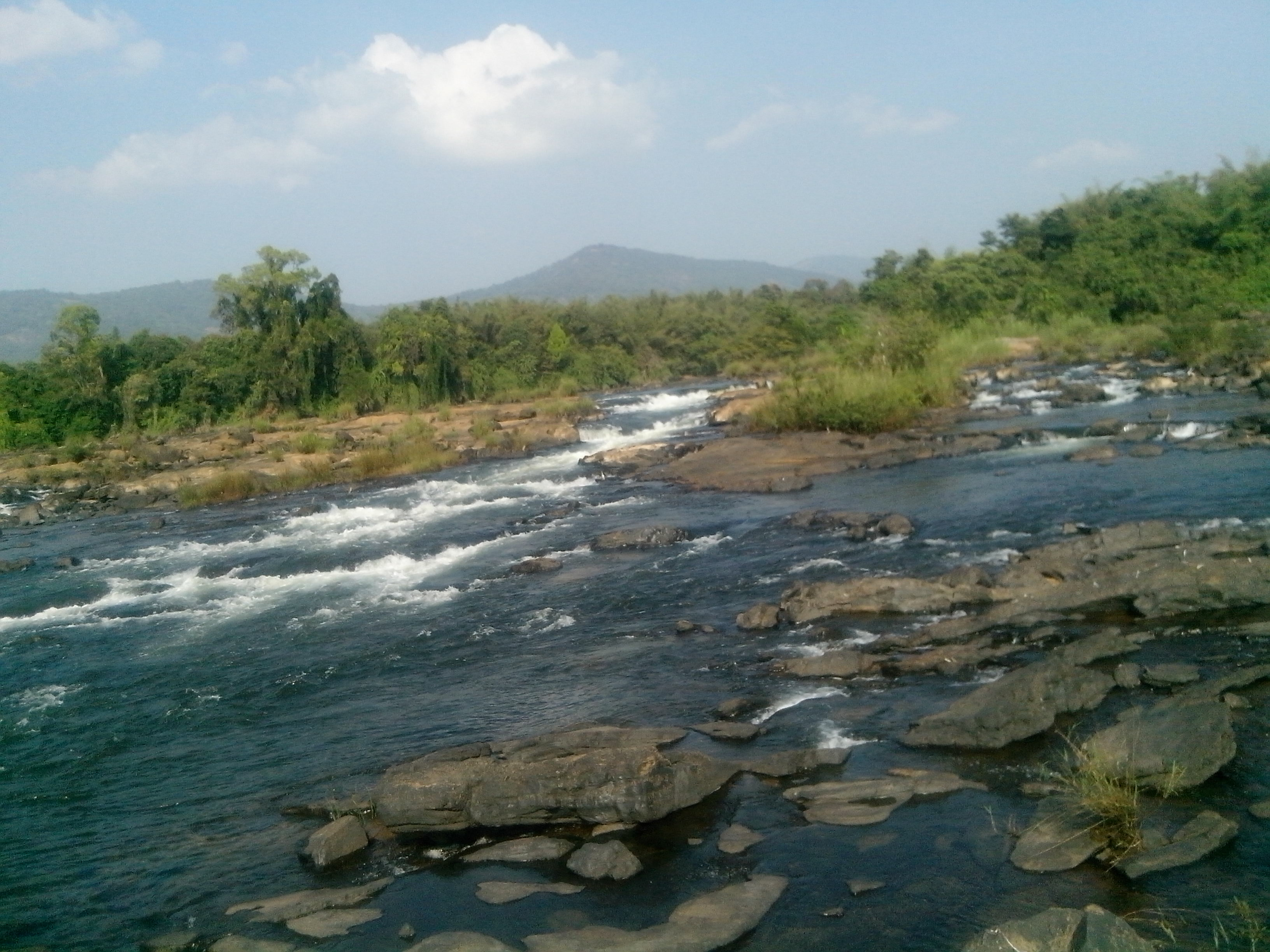 a good scene of paniyeliporu